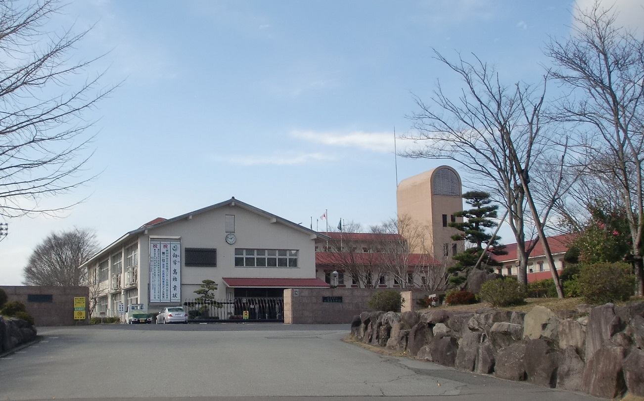 鹿児島県立松陽高等学校の外観。